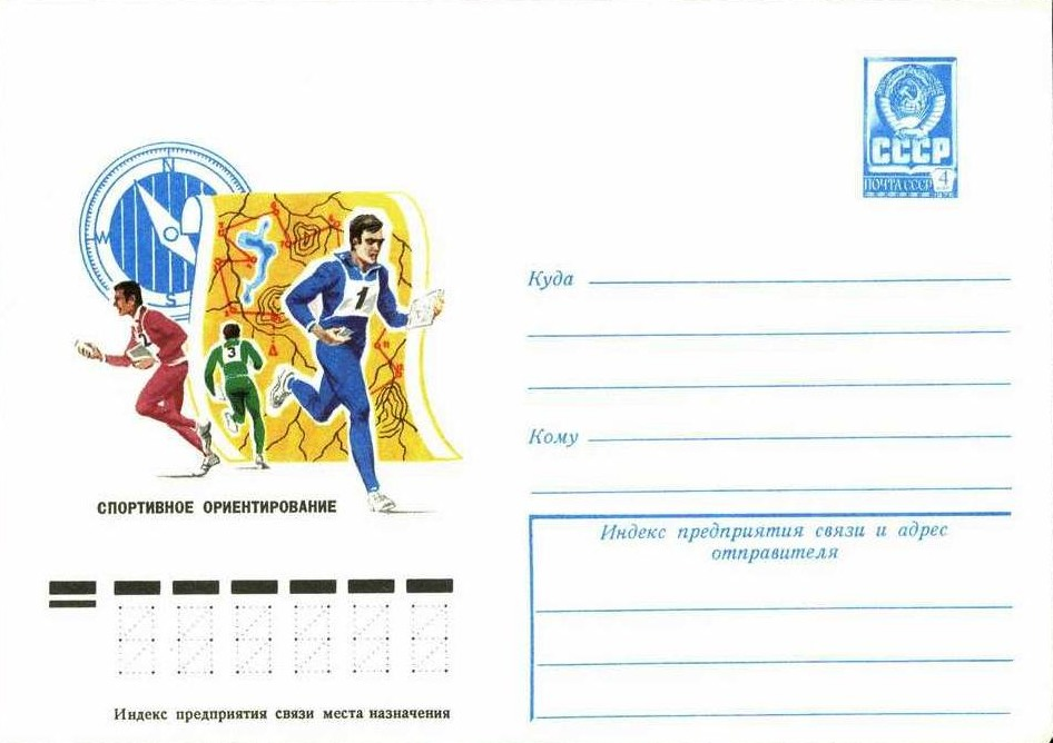 художественный маркированный конверт СССР, посвящённый спортивному ориентированию